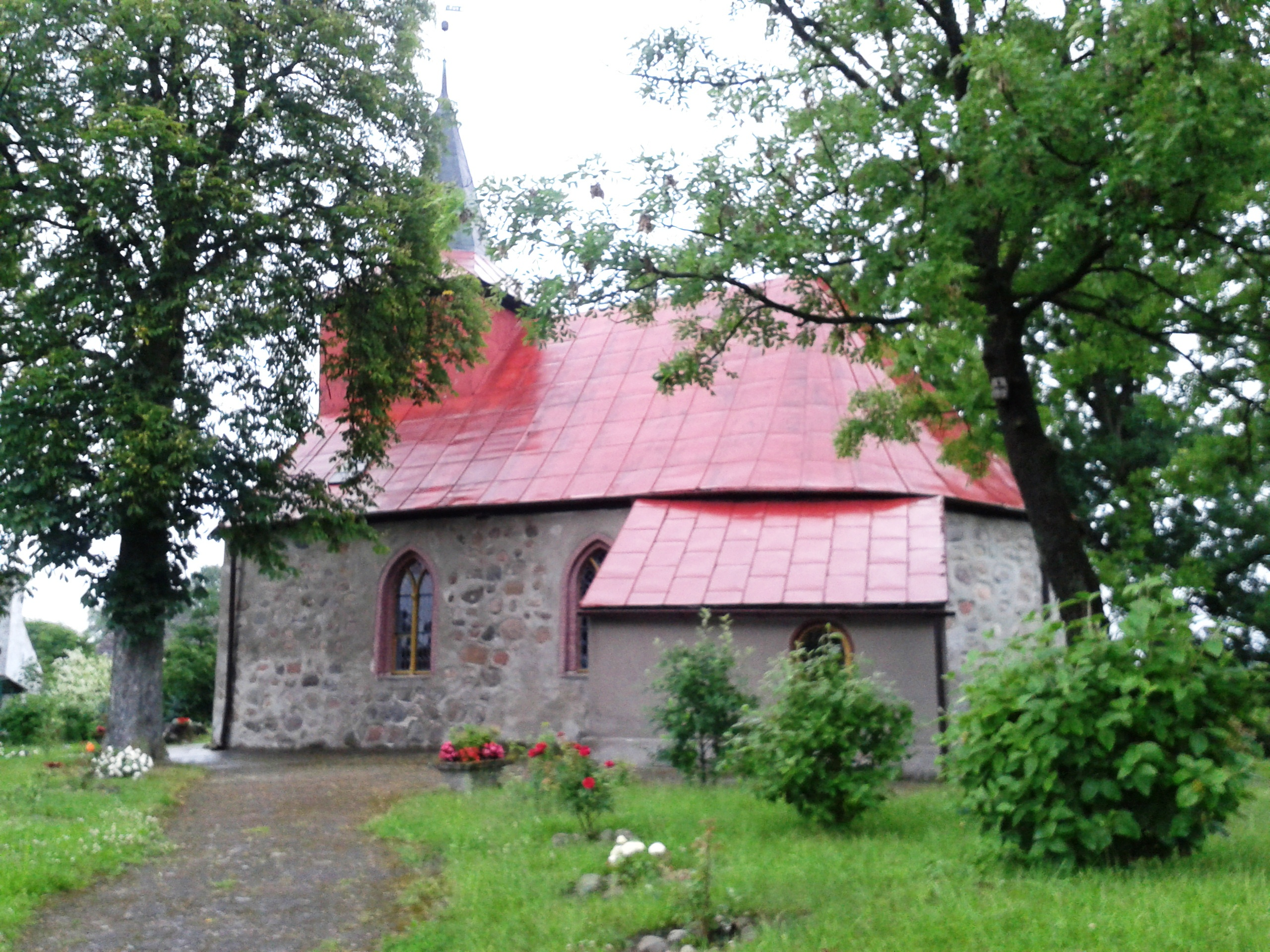 Łabędzie - filialny kościół rzymskokatolicki pw. św. Michała Archanioła (widok od drogi)